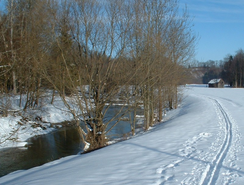 Laudach im Winter